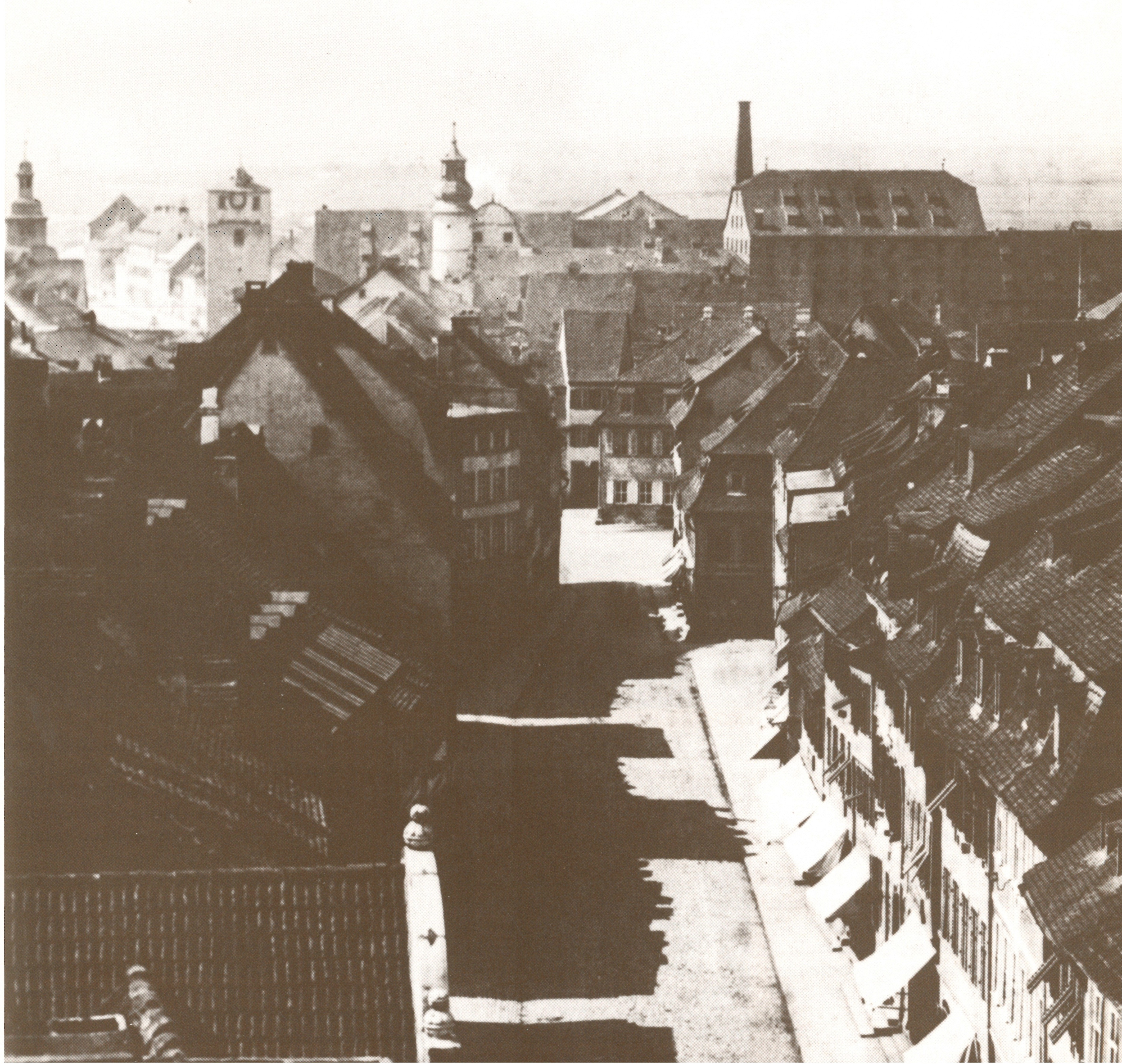 Schweinfurt Fotografie vor 1896: Spitaltor, Spitalkirche Heilig Geist, Zuckerfabrik Steinweg, Spitalgasse